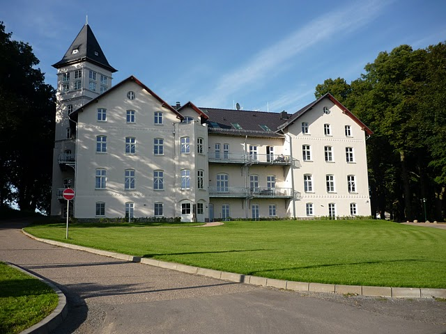 Schloss Hohen Niendorf